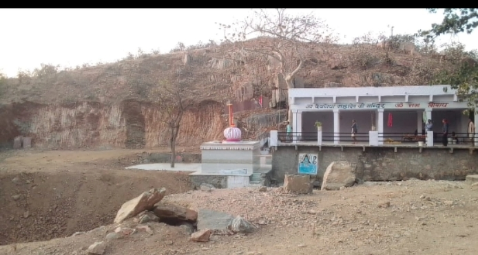 देवनिया महादेव मंदिर, सकालदा